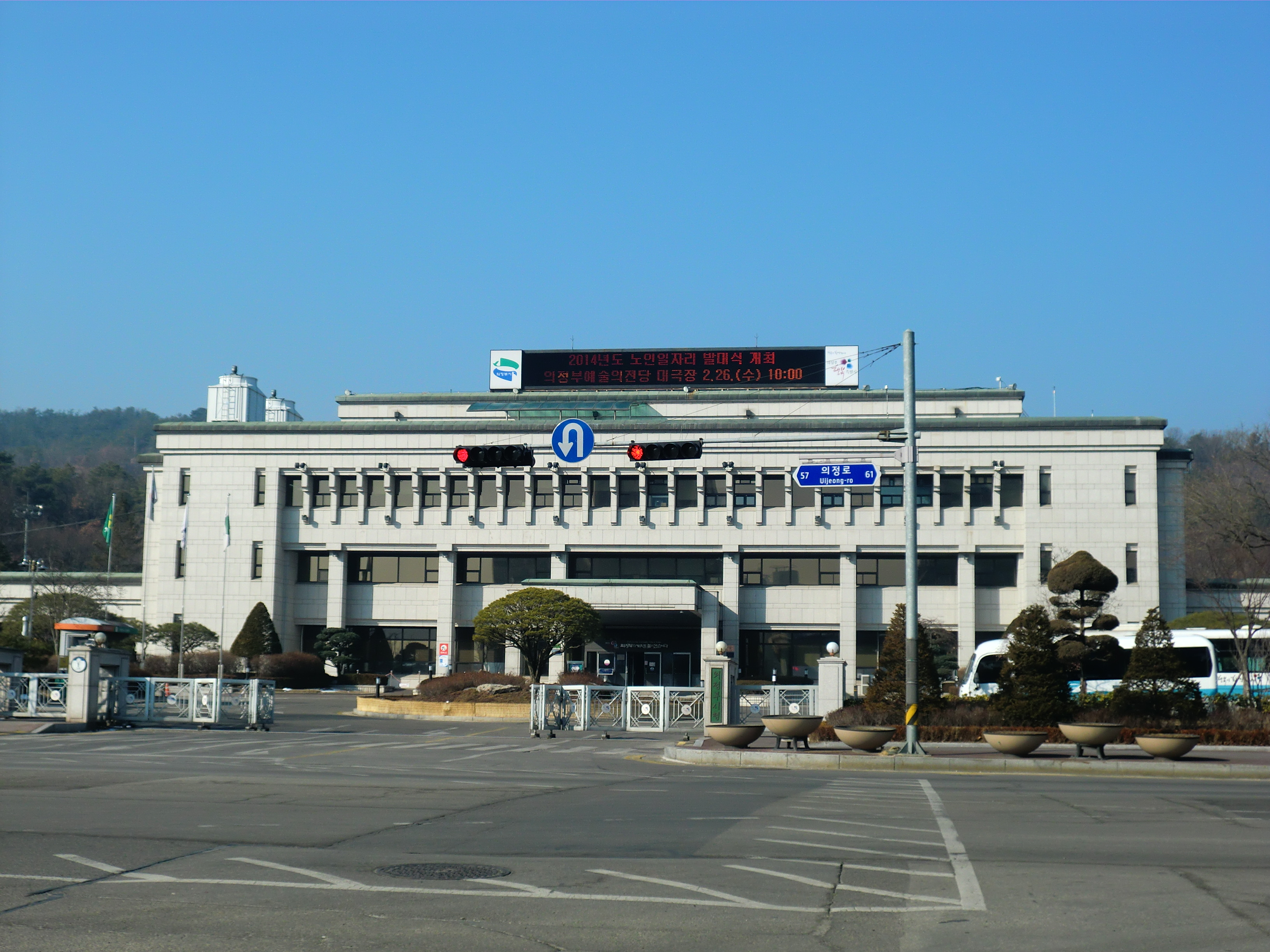 경기도 의정부시에 있는 의정부시청